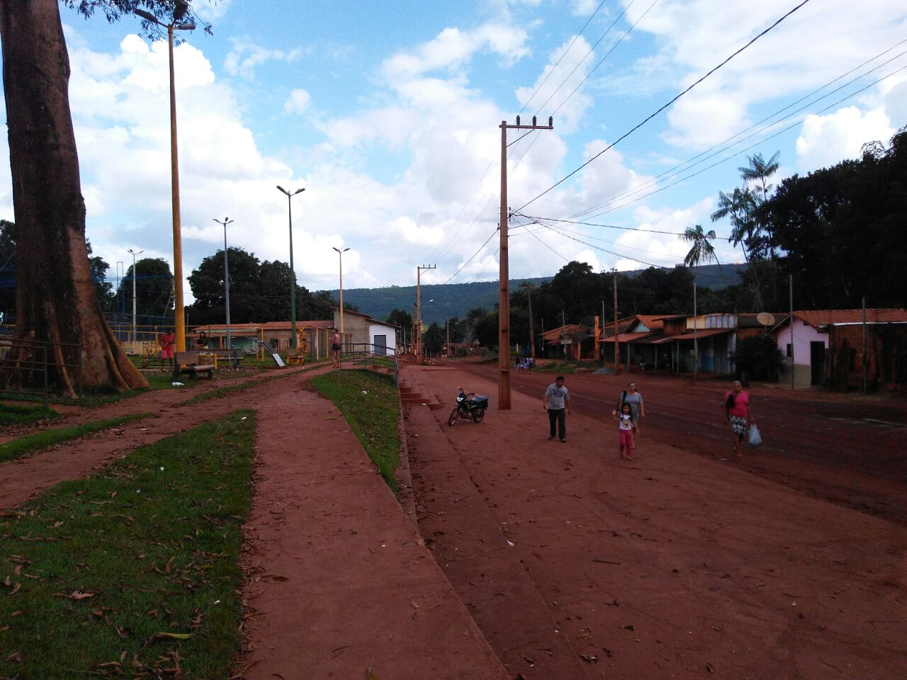 Avenida Nova República, no bairro Centro do distrito de Serra Pelada